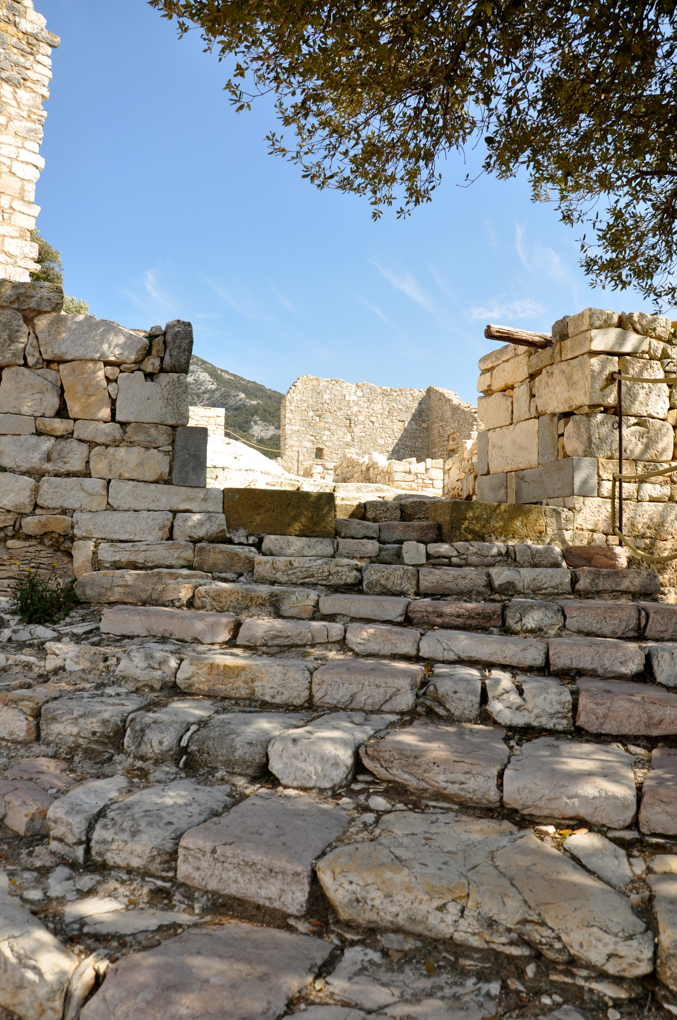 la porta